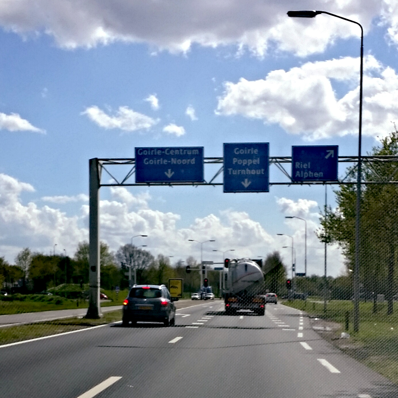 Oude provinciale weg N630 bij Tilburg, richting Goirle